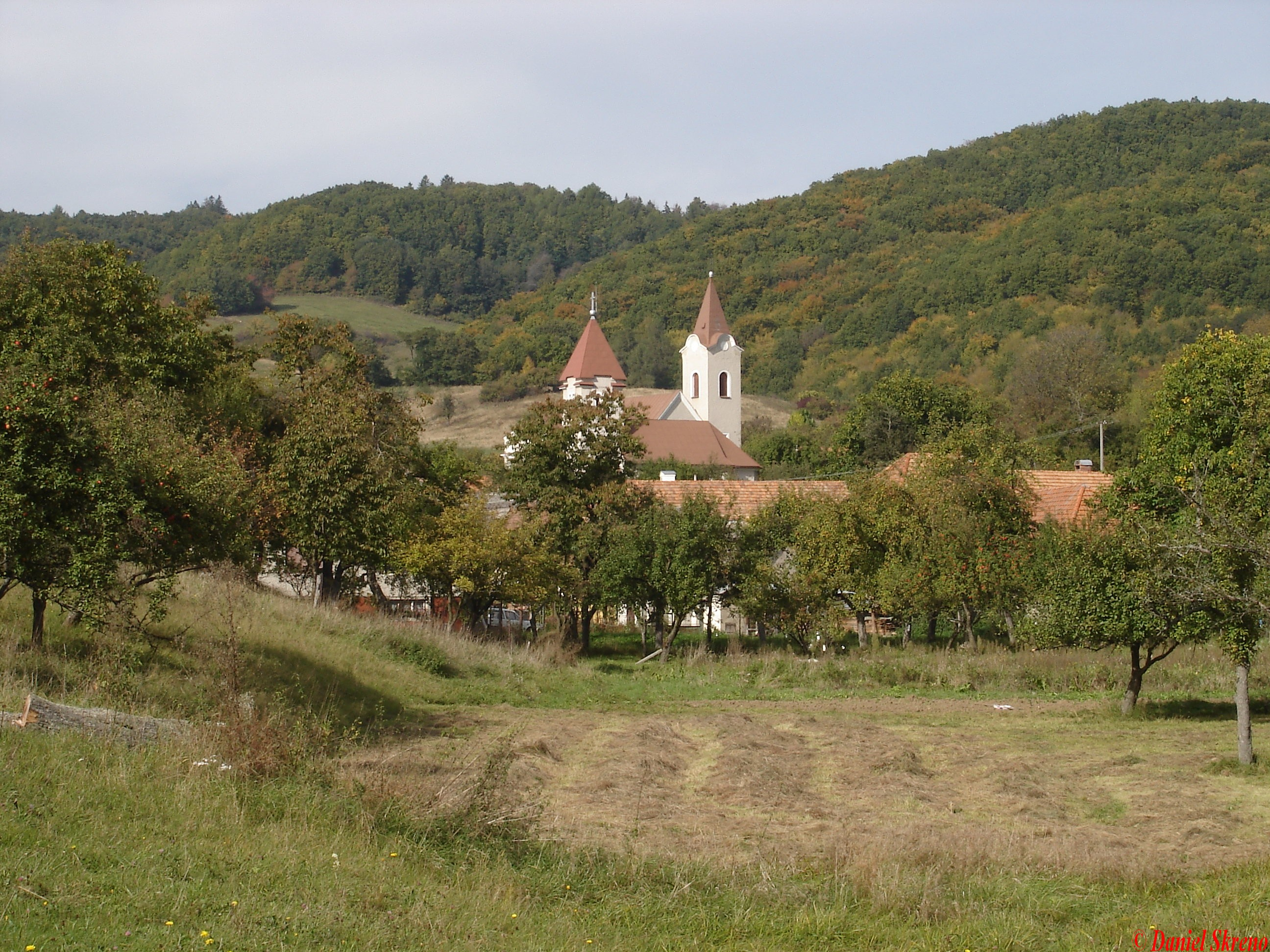 Dekýš- Evanjelický a katolícky kostol